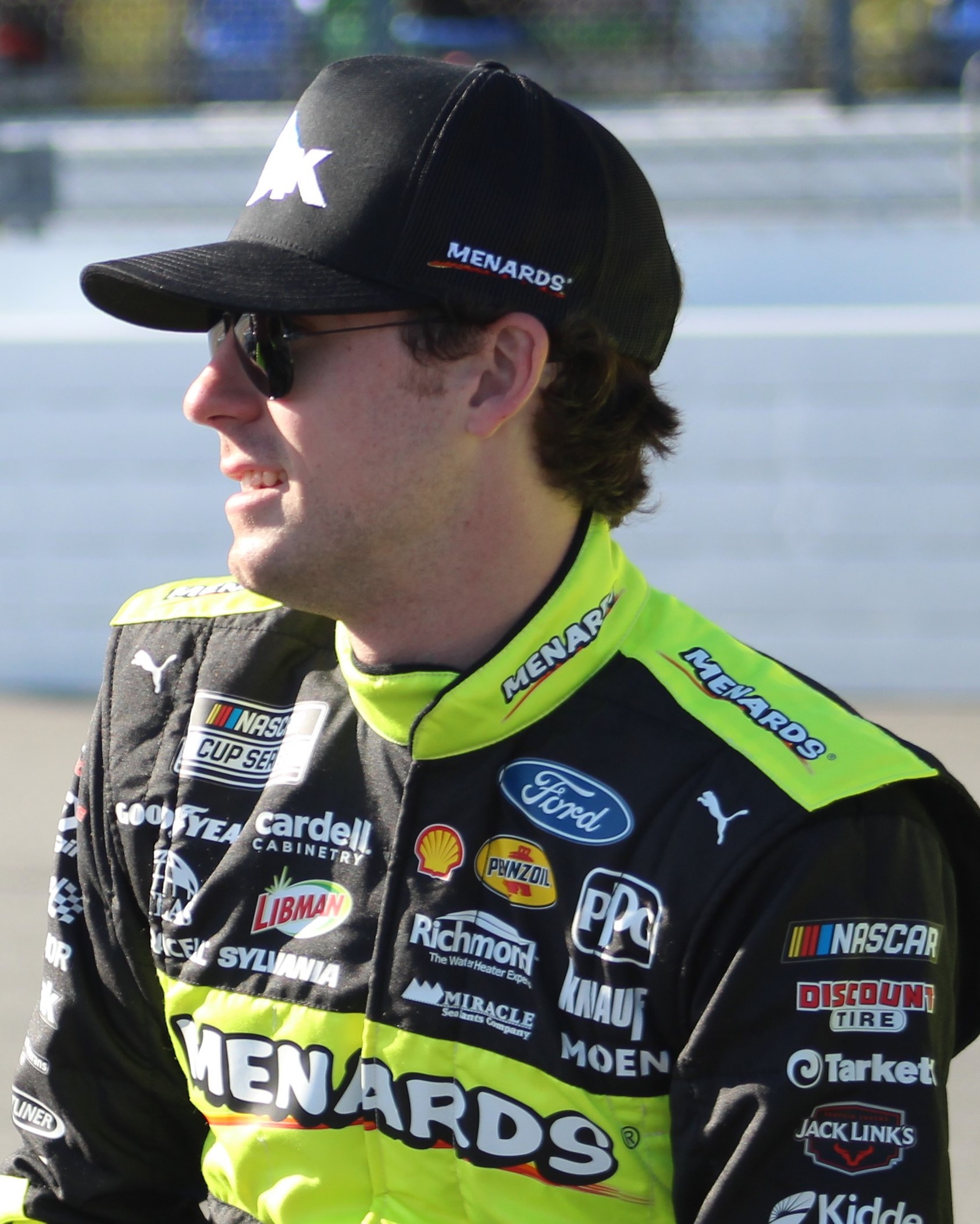 Daytona Speekweeks, 2020